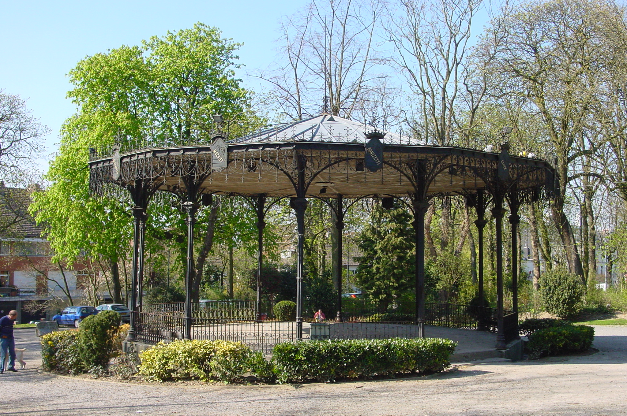 Le kiosque à musique de Cambrai, l'un des plus anciens de France (1867) The bandstand in Cambrai, one of the oldest in France (1867)